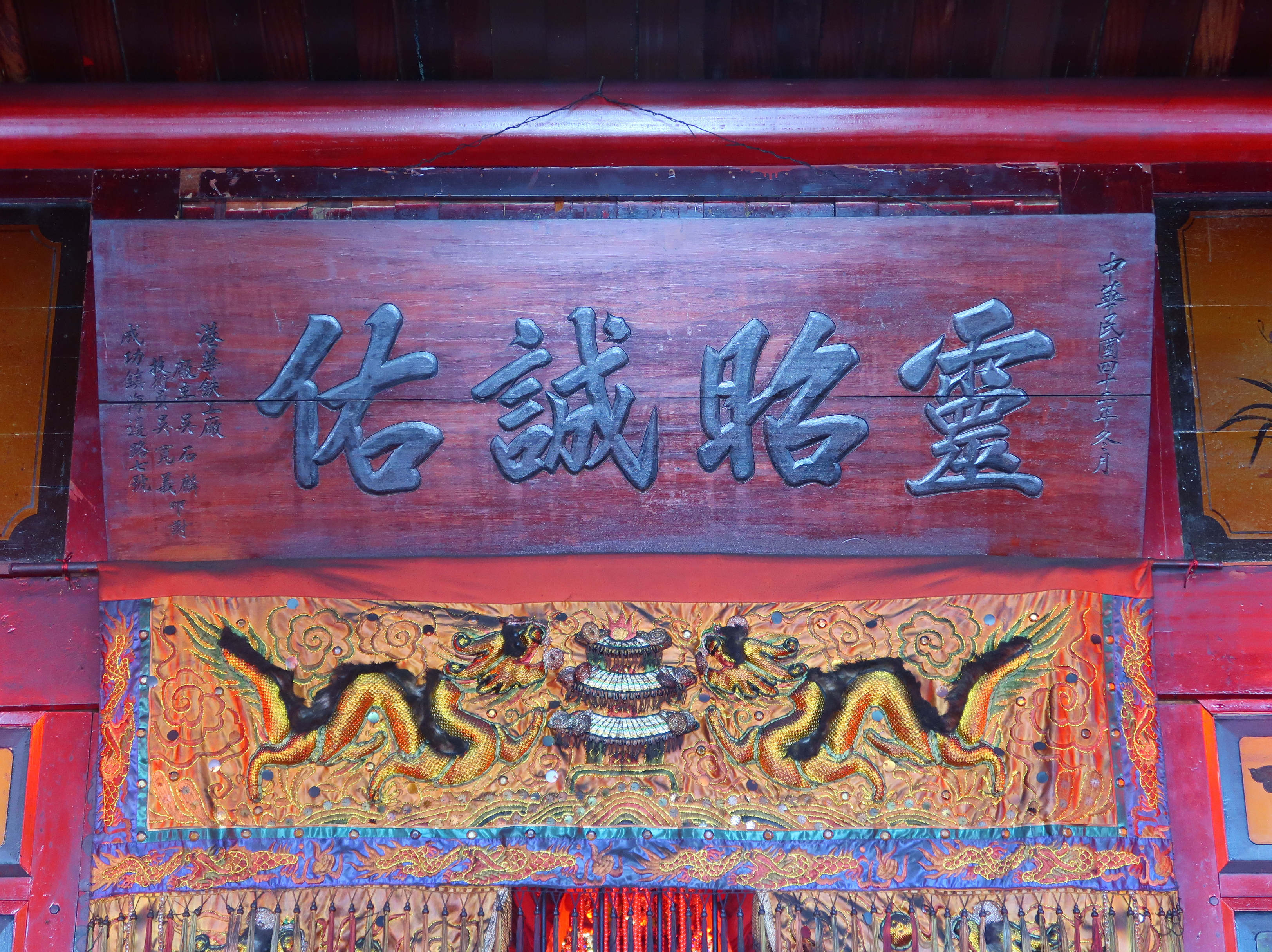 又作小港天后宮，地址：臺東縣成功鎮成廣路33號